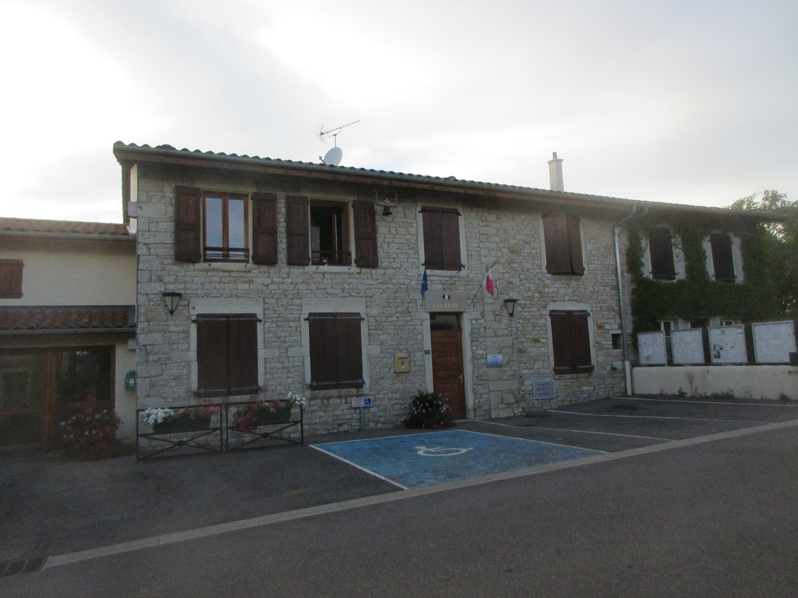 Mairie de Grand-Corent.